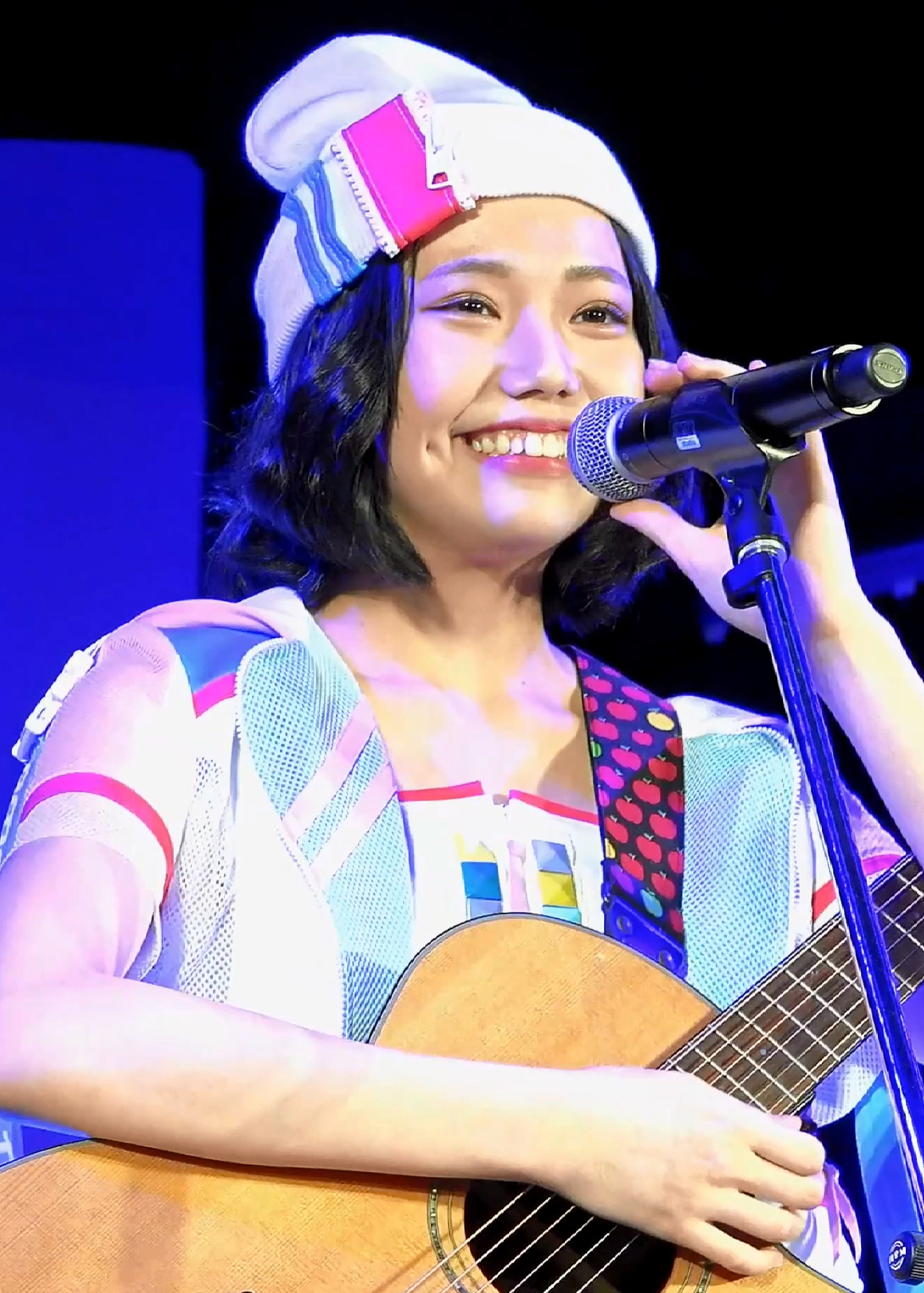 AKB48 チーム8ライブ福井 小浜市 まちの駅 旭座1周年記念イベント 前座 長久玲奈『Why me』